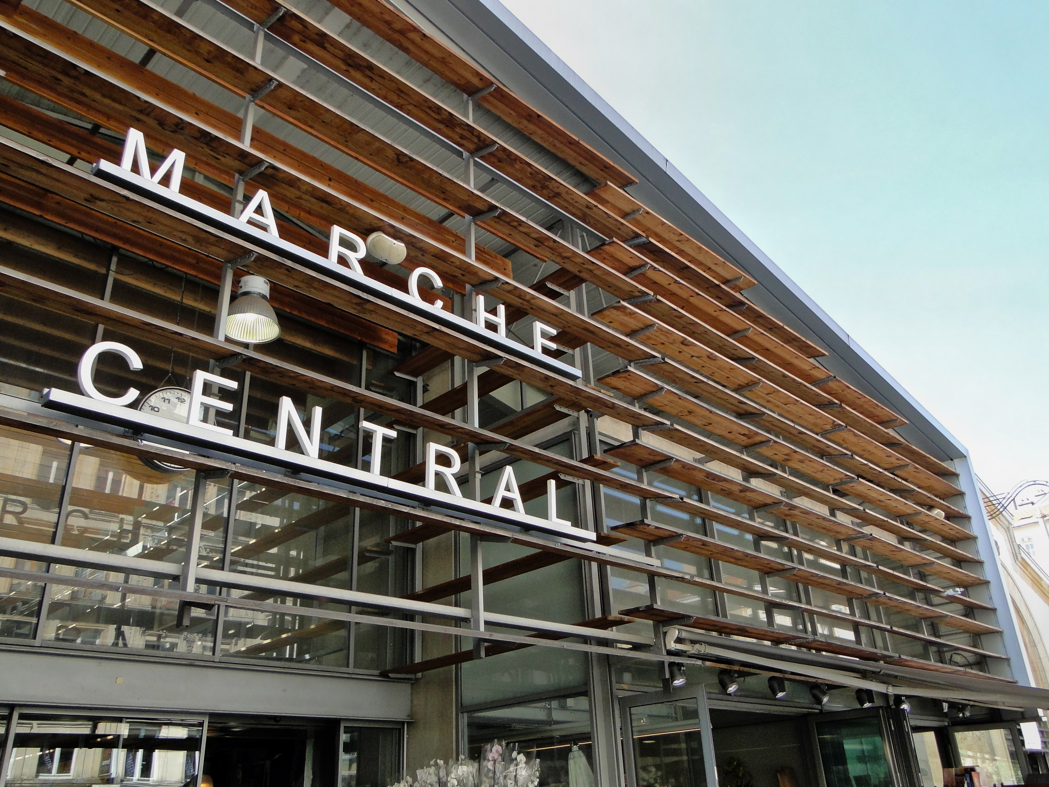 Marché couvert de Nancy La Grande Halle de 2 100 m² a été refaite en 2006. La structure métallique est d'origine. Caractéristiques Ville : Nancy (54000) Quartier : Charles III - Centre ville Adresse: rue Saint-Dizier Livraison : 2006 Fonction : Commerces et activités Architecte : Catherine Boulange, Mérouane Hanafi, Christophe Henry Entreprise générale : Eiffage Construction Lorraine Données techniques Niveaux : R+1 Hauteur : 7.00 m SHON : 2 100 m²